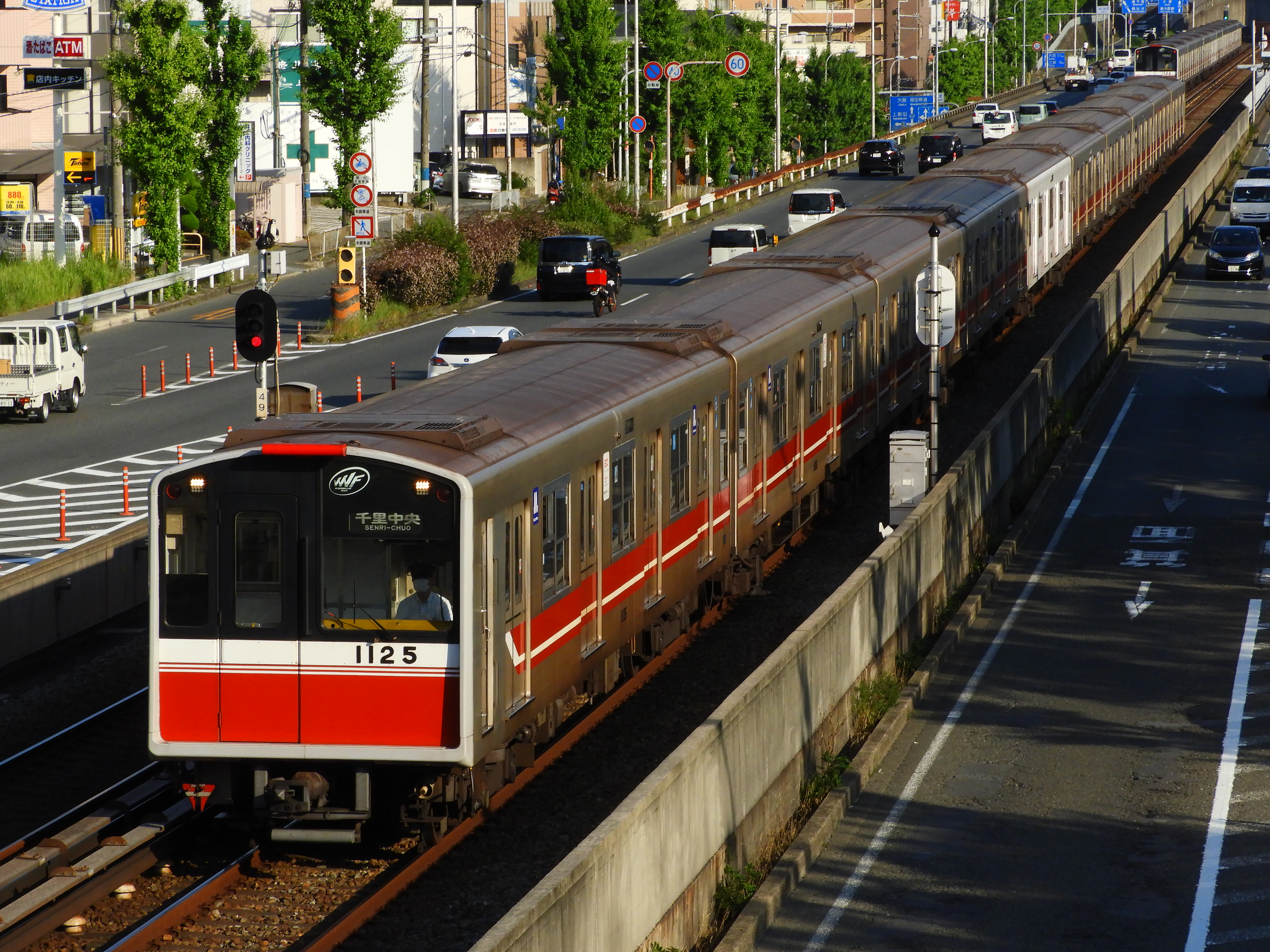 Osaka Metro10A系1125F 桃山台～千里中央